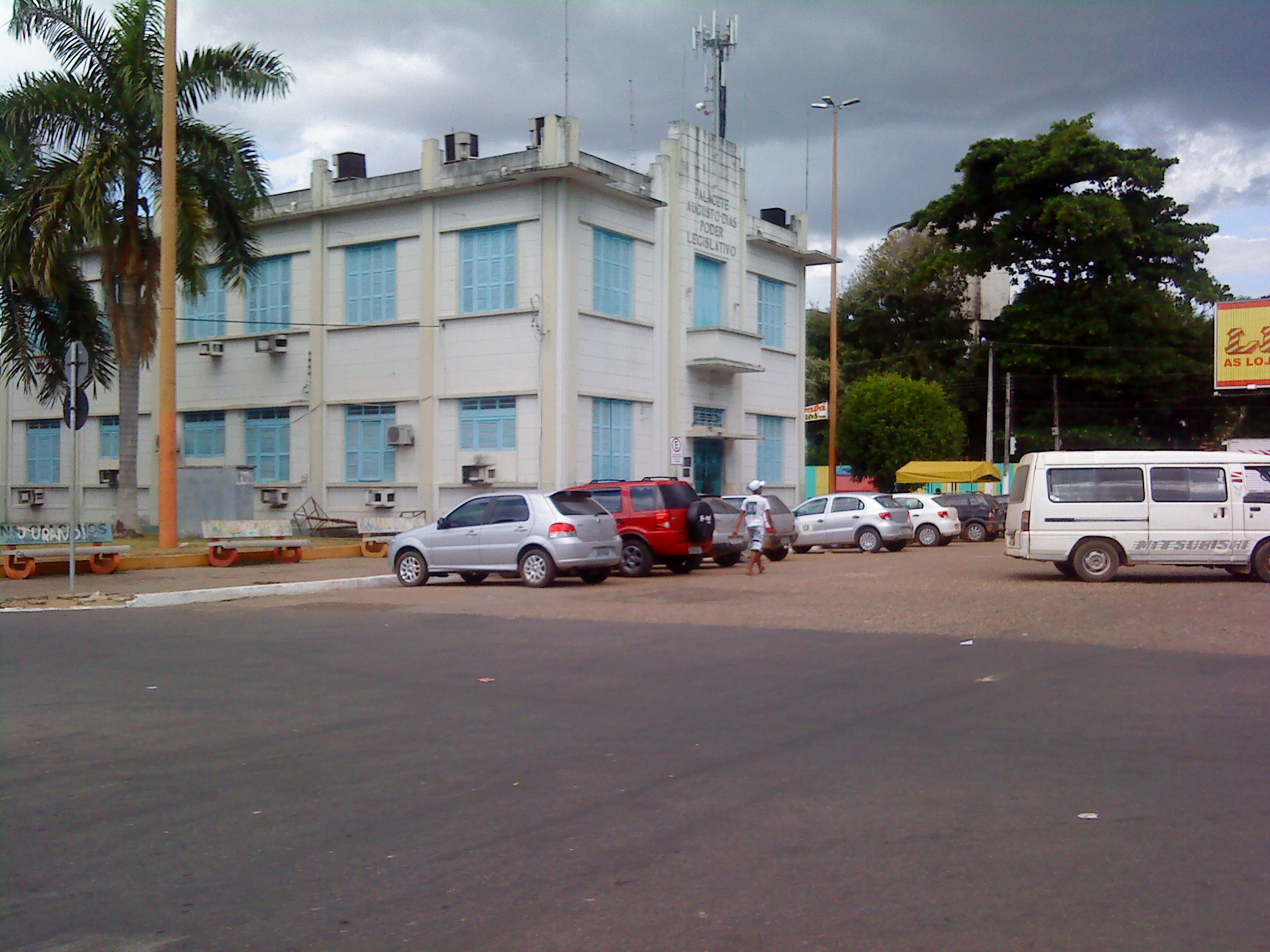 Palacete Augusto Dias, no bairro do Comércio, antiga sede do poder legislativo municipal de Marabá.